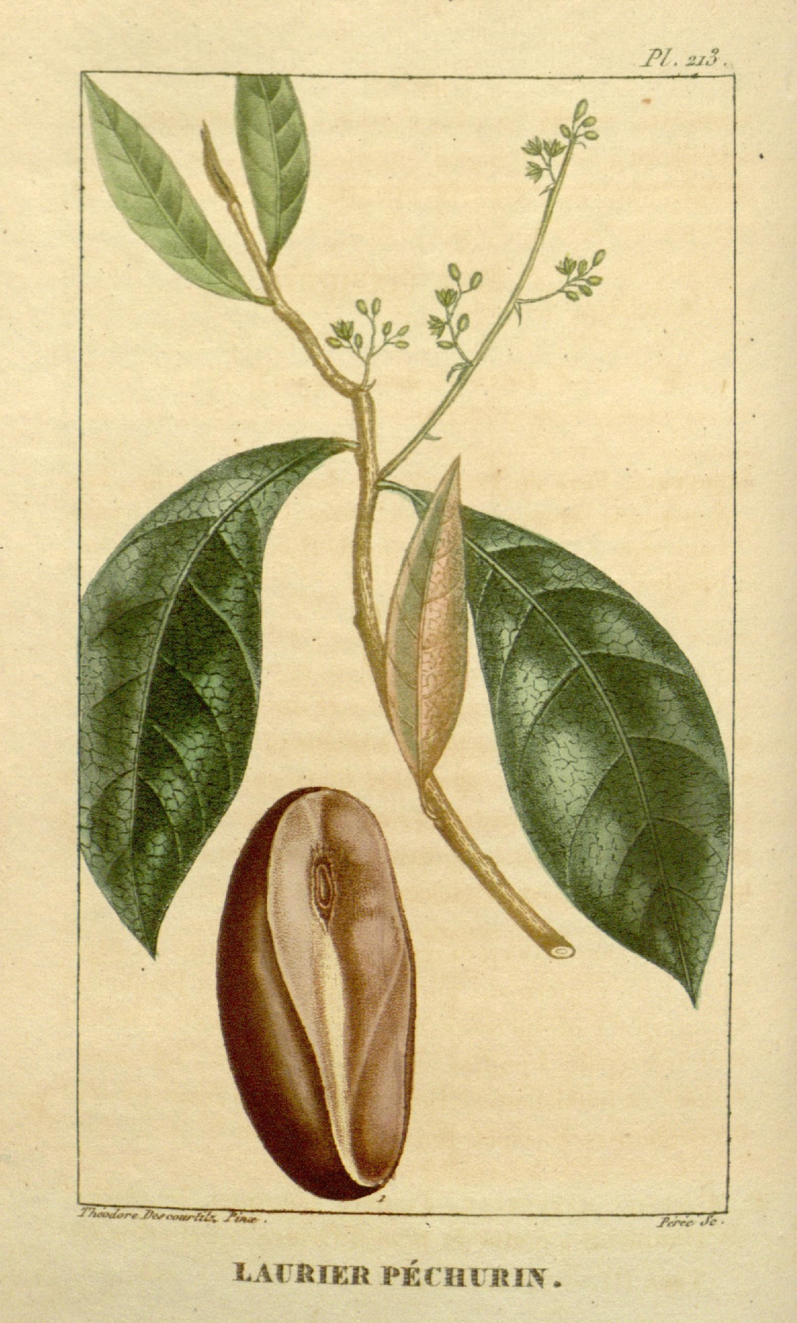 P/.::j lAoadsrt J/e,„,t,r^i^ v»« LArUlEIl PÉ. HURIX.